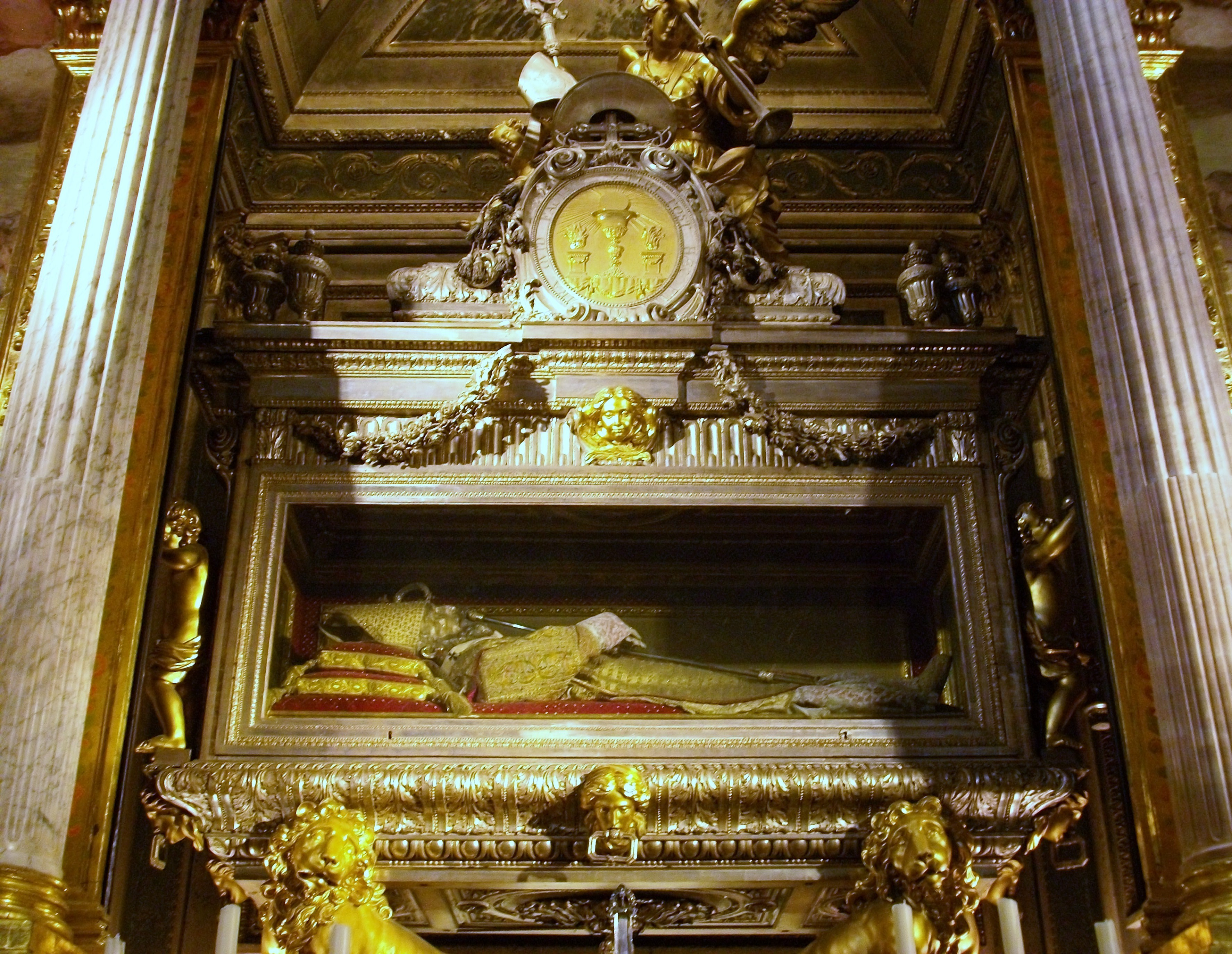 Urna sepulcral de Joan de Ribera, col·legi del Corpus Christi, València.